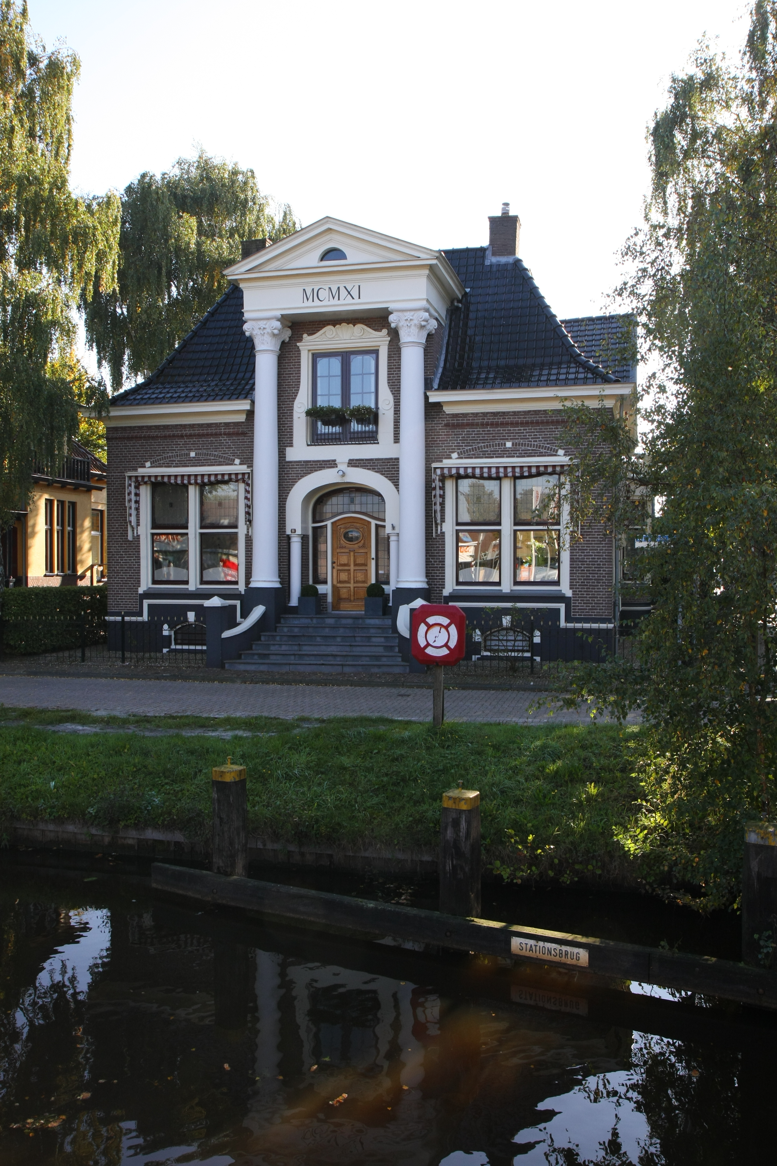 Herenhuis te Wildervank